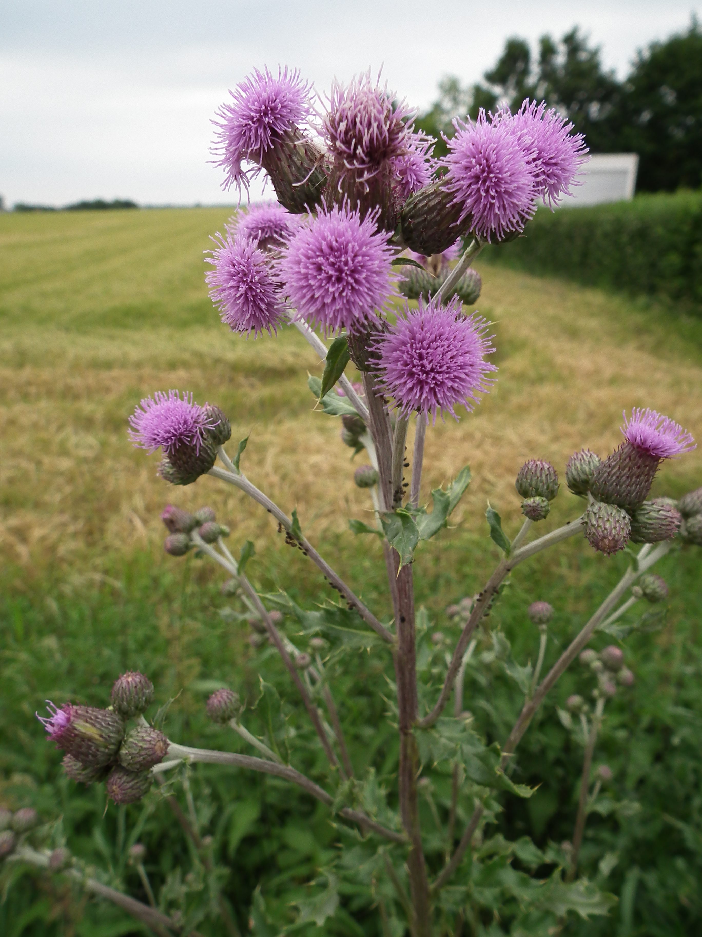 Blühende Acker-Kratzdistel (Cirsium arvense), fotografiert in Nordbaden (Deutschland)